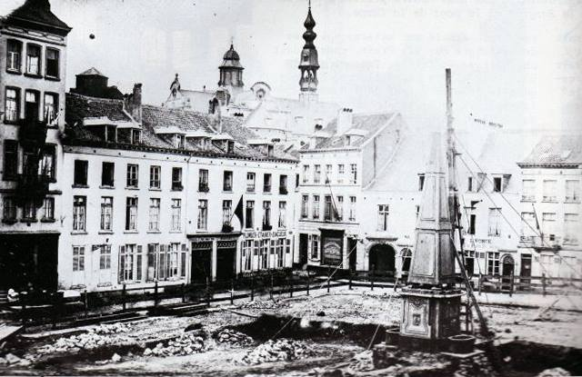 Construction des halles Saint Géry vers 1881